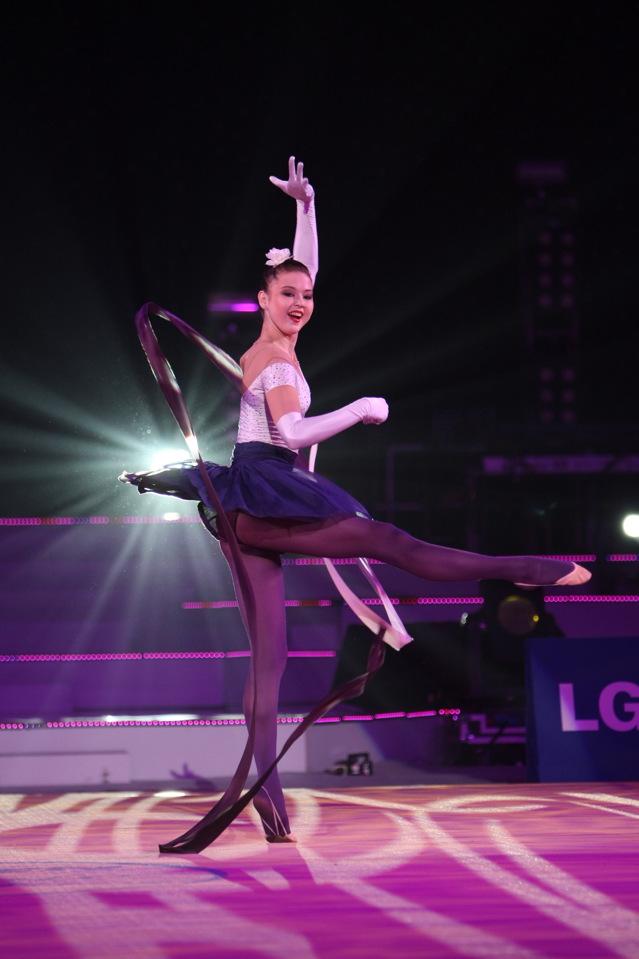 LG전자가 11일(土, 오후 3시), 12일(日, 오후 2시) 양일간 고려대학교 화정체육관 특설무대에서 국내 최초 리듬체조 갈라쇼인 ‘LG WHISEN Rhythmic All Stars 2011’ 행사를 개최했다. 사진은 11일 고려대학교 화정체육관 특설무대에서 열린 ‘LG WHISEN Rhythmic All Stars 2011’ 행사에서 LG ‘휘센’ 광고모델인 손연재(18세, 세종고) 선수를 비롯해 국내외 전•현역 리듬체조 스타들이 총출동해 멋진 리듬체조를 보여줬다.